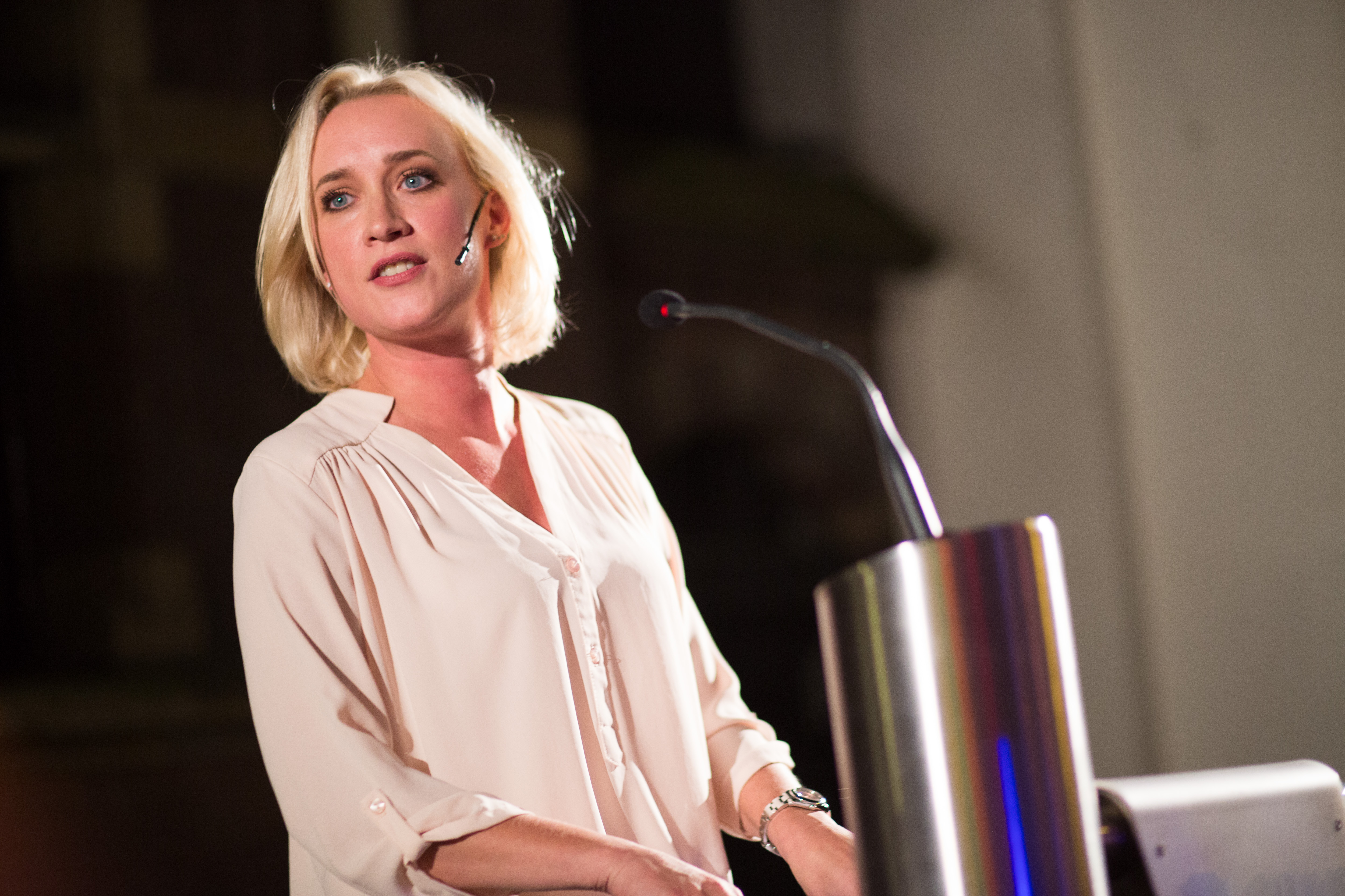 De Nacht van de Journalistiek beleefde dit jaar haar lustrum. Deze tiende editie van dit jaarlijks evenement werd daarom omgedoopt tot het Festival van de Journalistiek. Tijdens het festival stonden veel kleinschalige workshops waarin professionals in gesprek gingen met beginnende journalisten centraal. Het thema van het festival was “Leren specialiseren”. En natuurlijk was er ook muziek, humor en lekker eten.